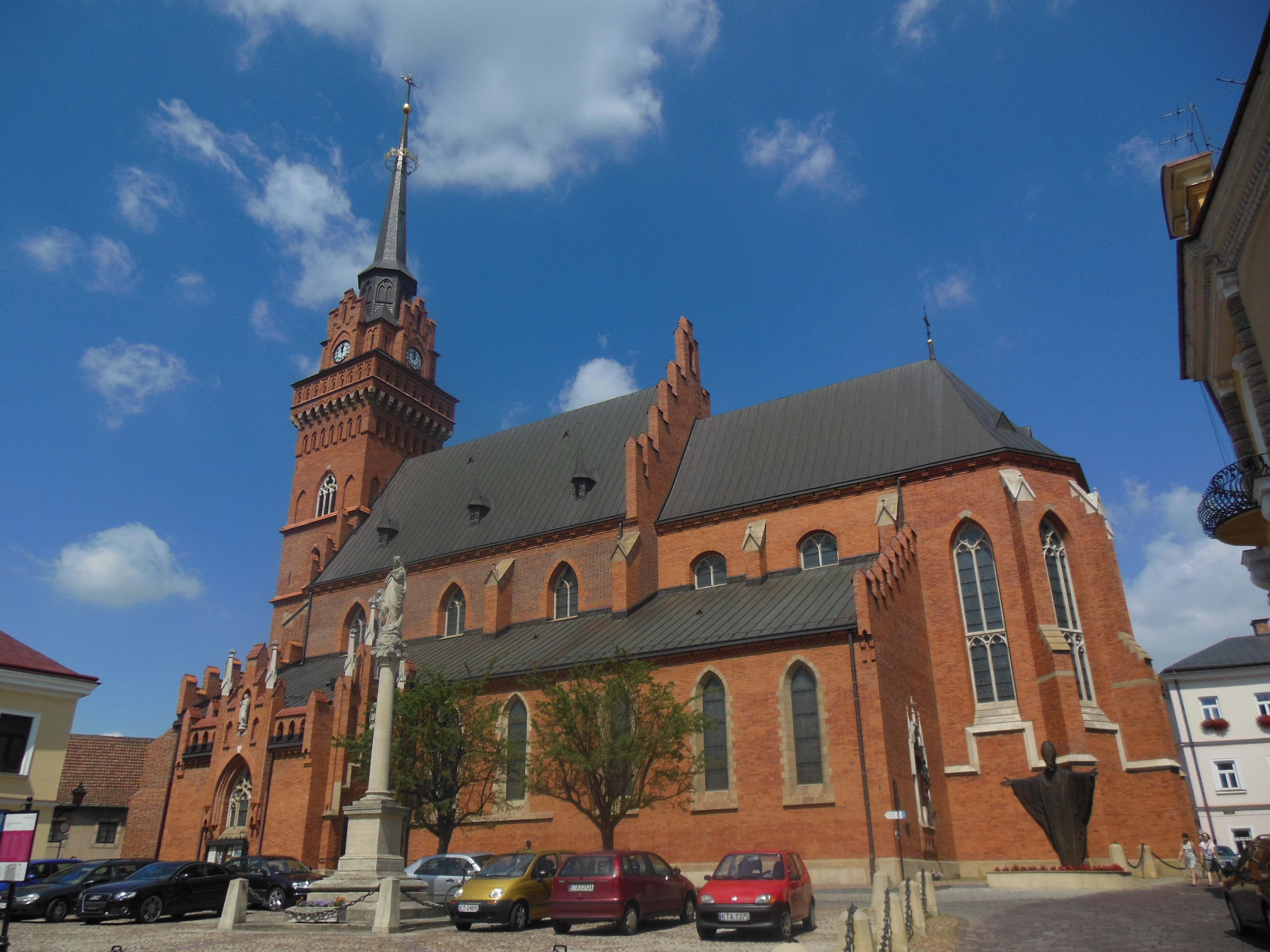 Tarnowska Katedra Narodzenia NMP.